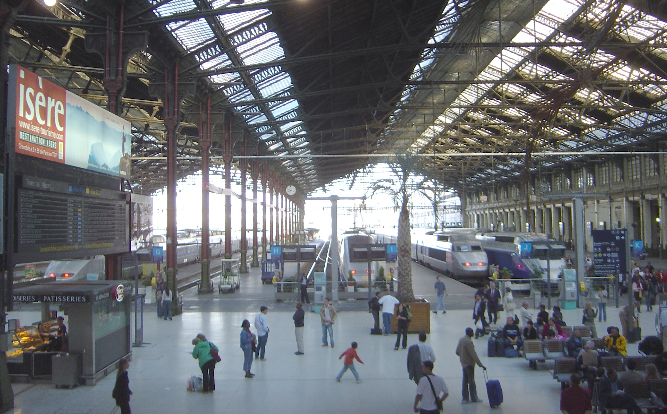 Paris, Gare de Lyon, TGV 2005/06/11